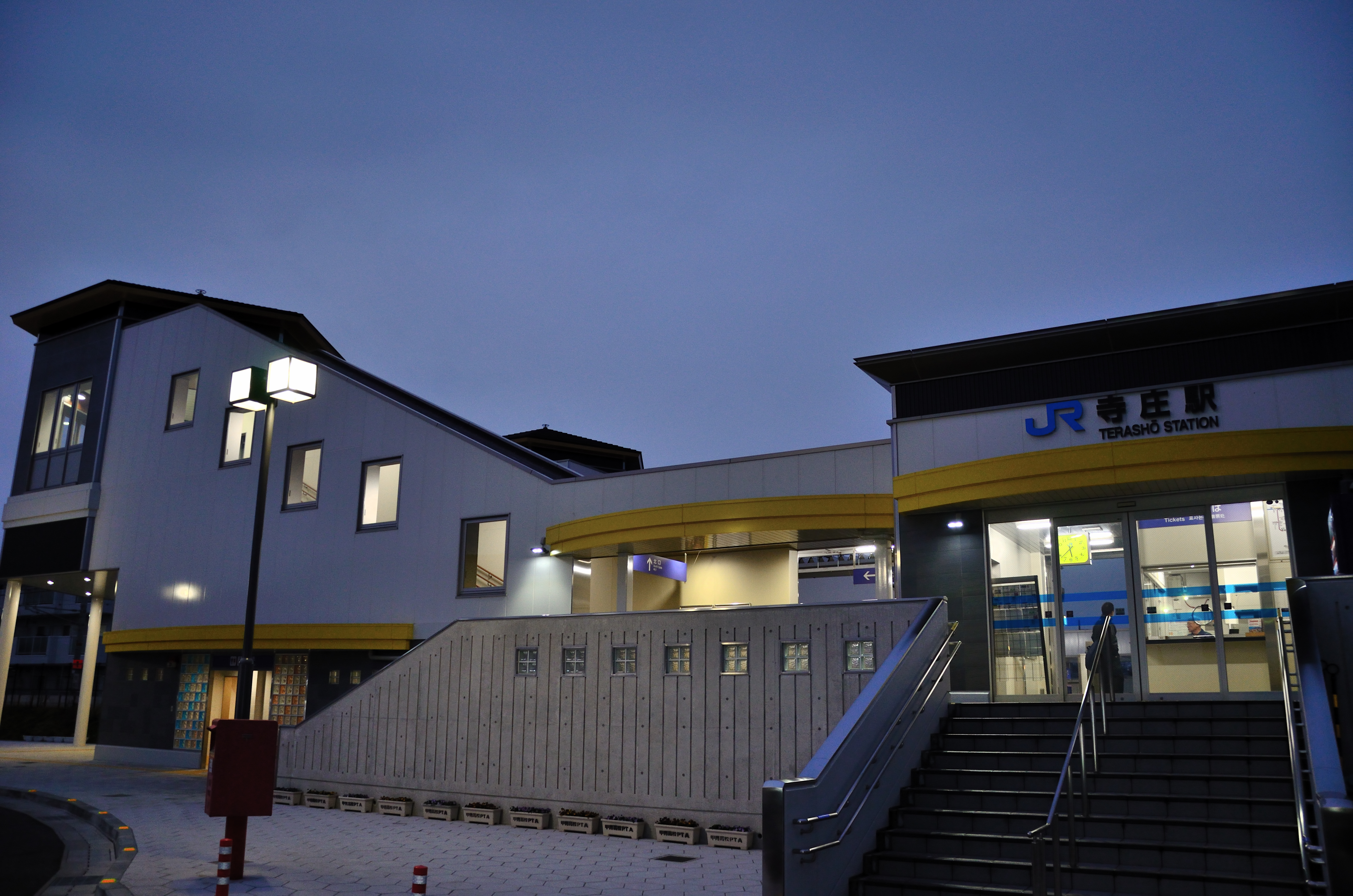 寺庄駅南口